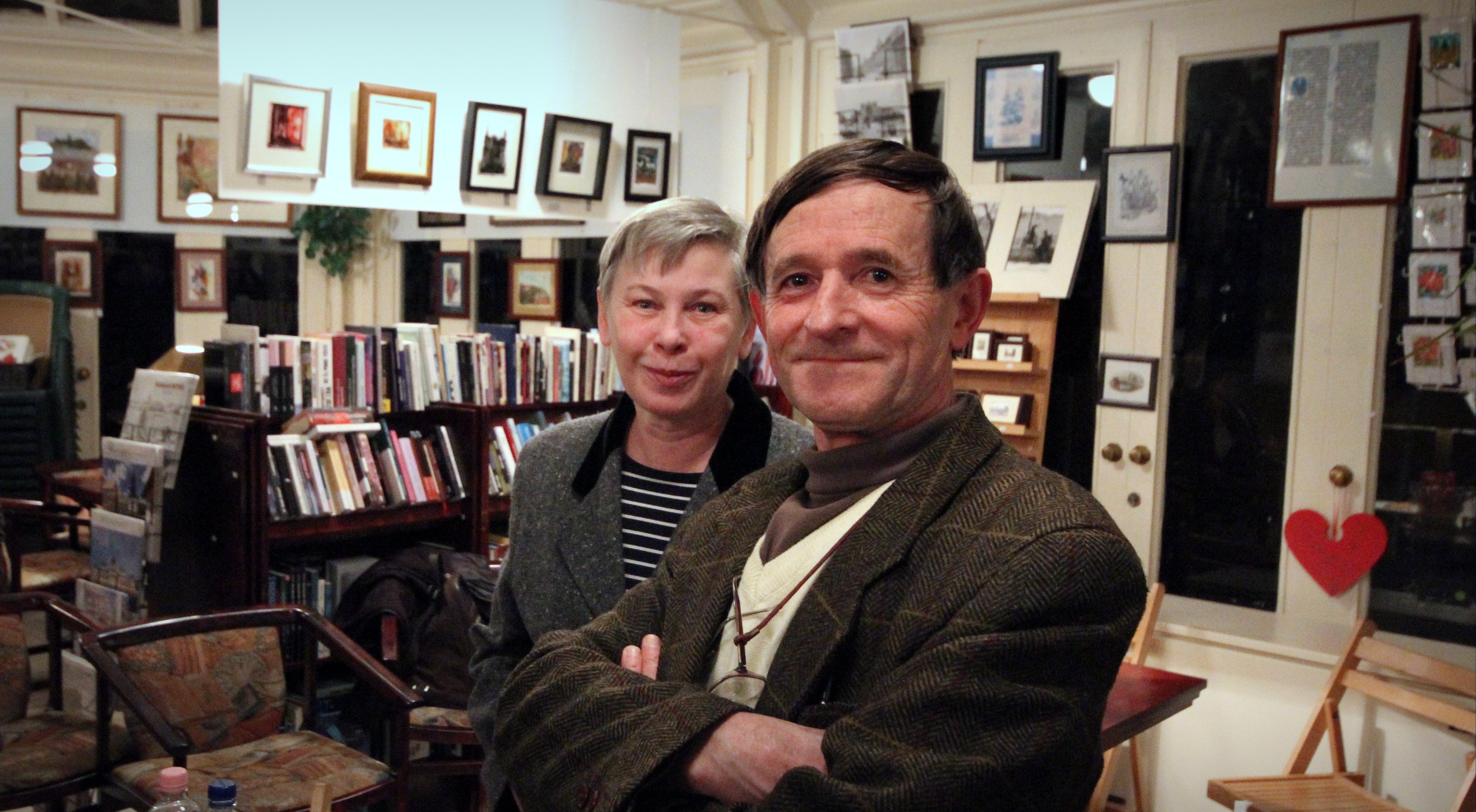 Esti könyvbemutató a Liteában. A képen Mósrer Zoltán és Kerny Terézia. Litea Könyvesbolt és Teázó: Budapest, Hess András tér 4